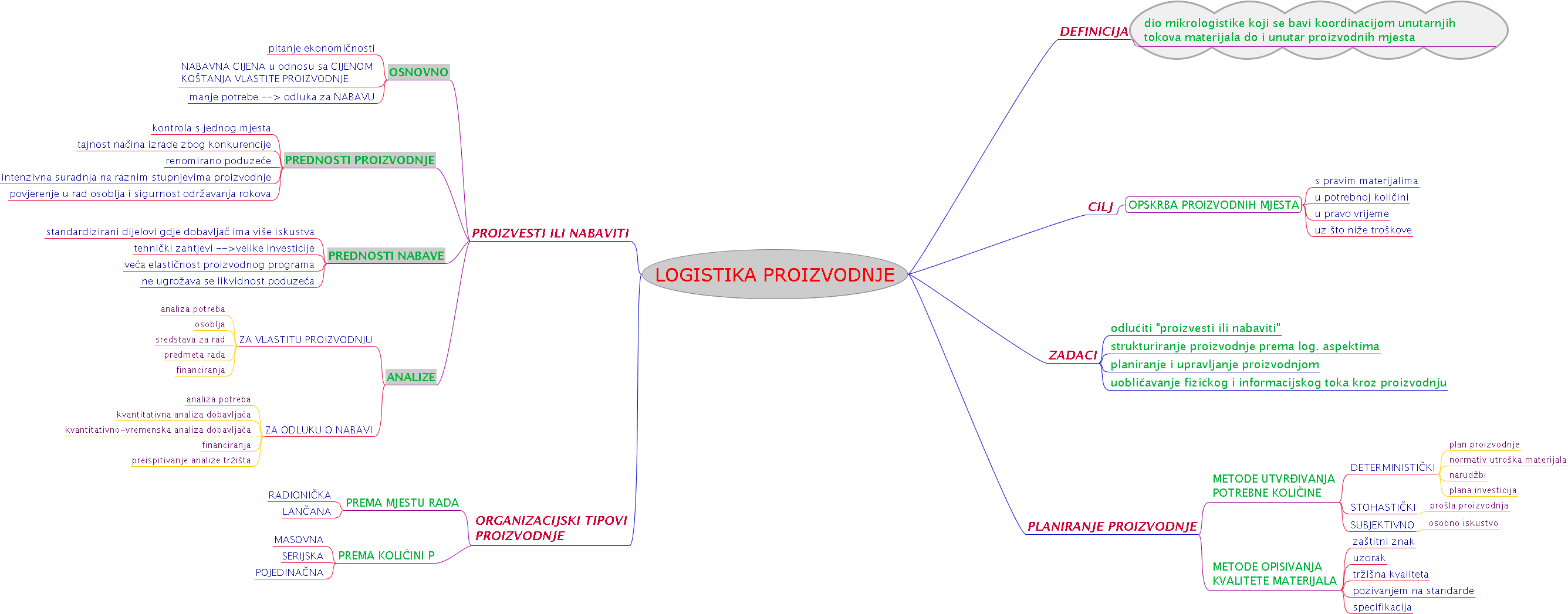 Logistika proizvodnje